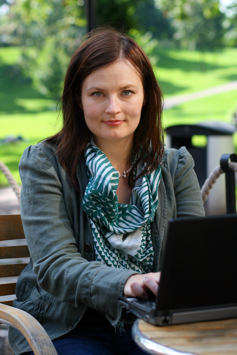 Kristiina Kokko, Kokoomuksen poliittinen suunnittelija